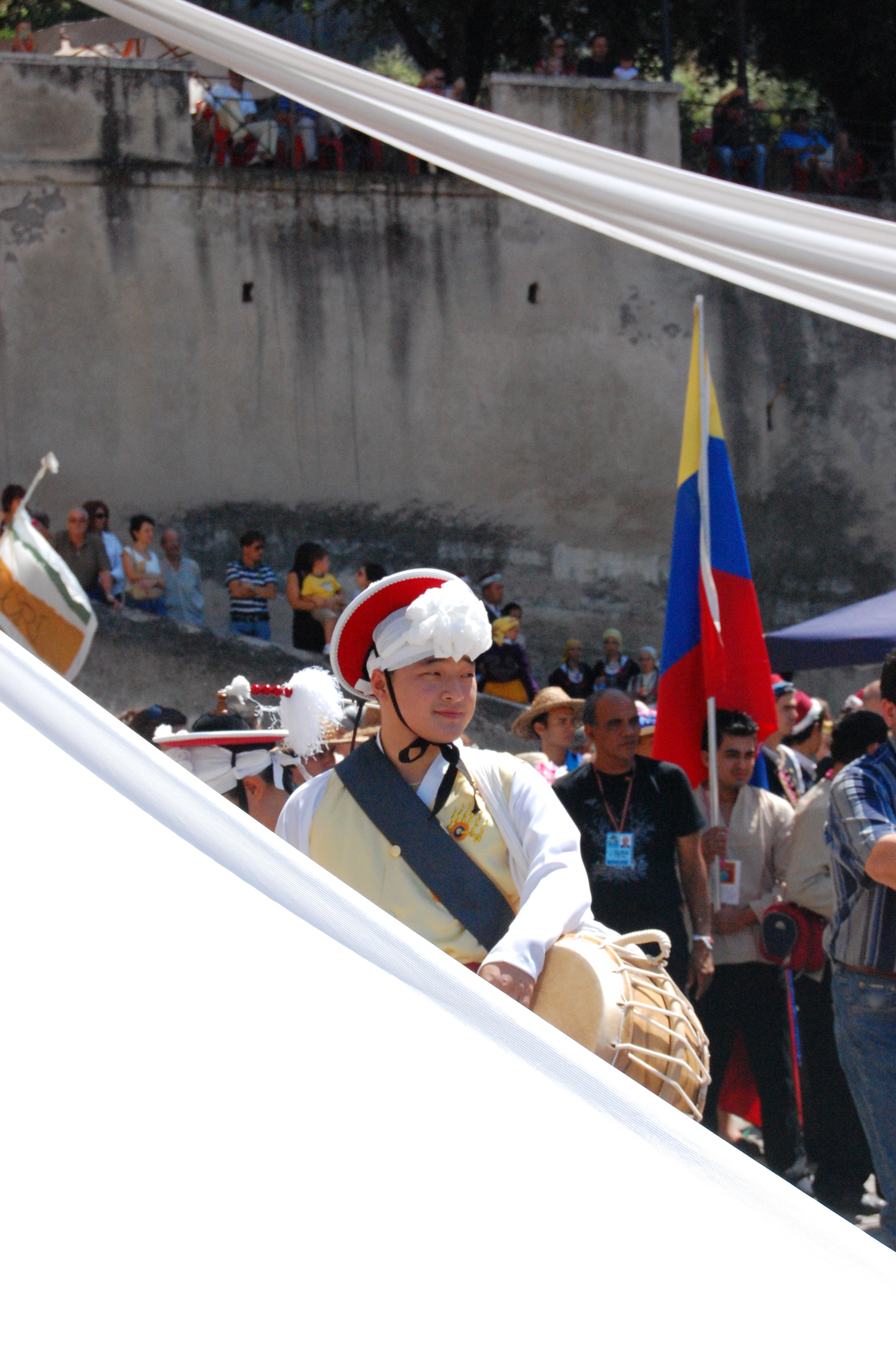 Artista coreano durante una esibizione pubblica al Latium Festival